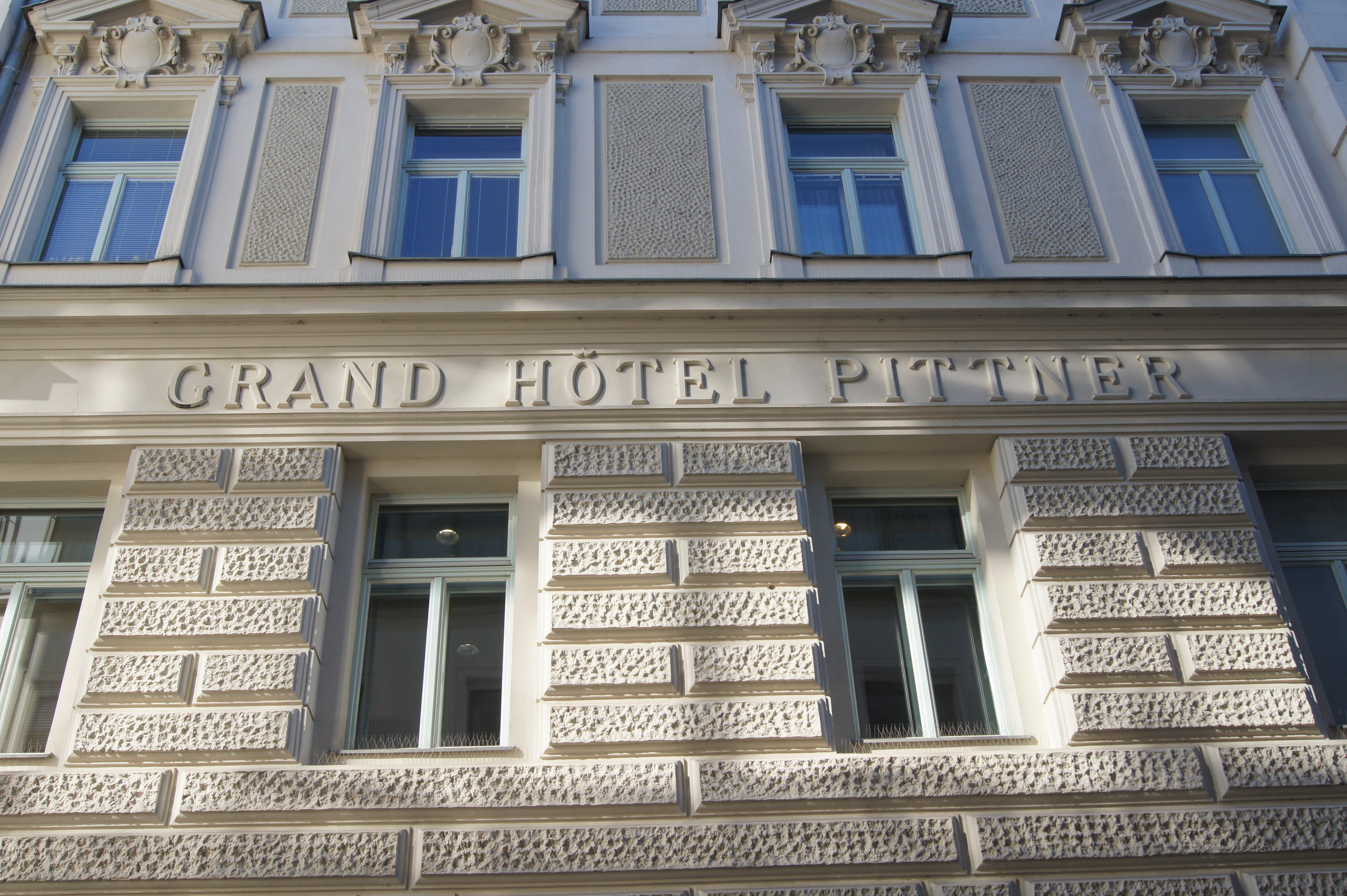 Ehem. Grandhotel Pittner (Zum rothen Krebs)